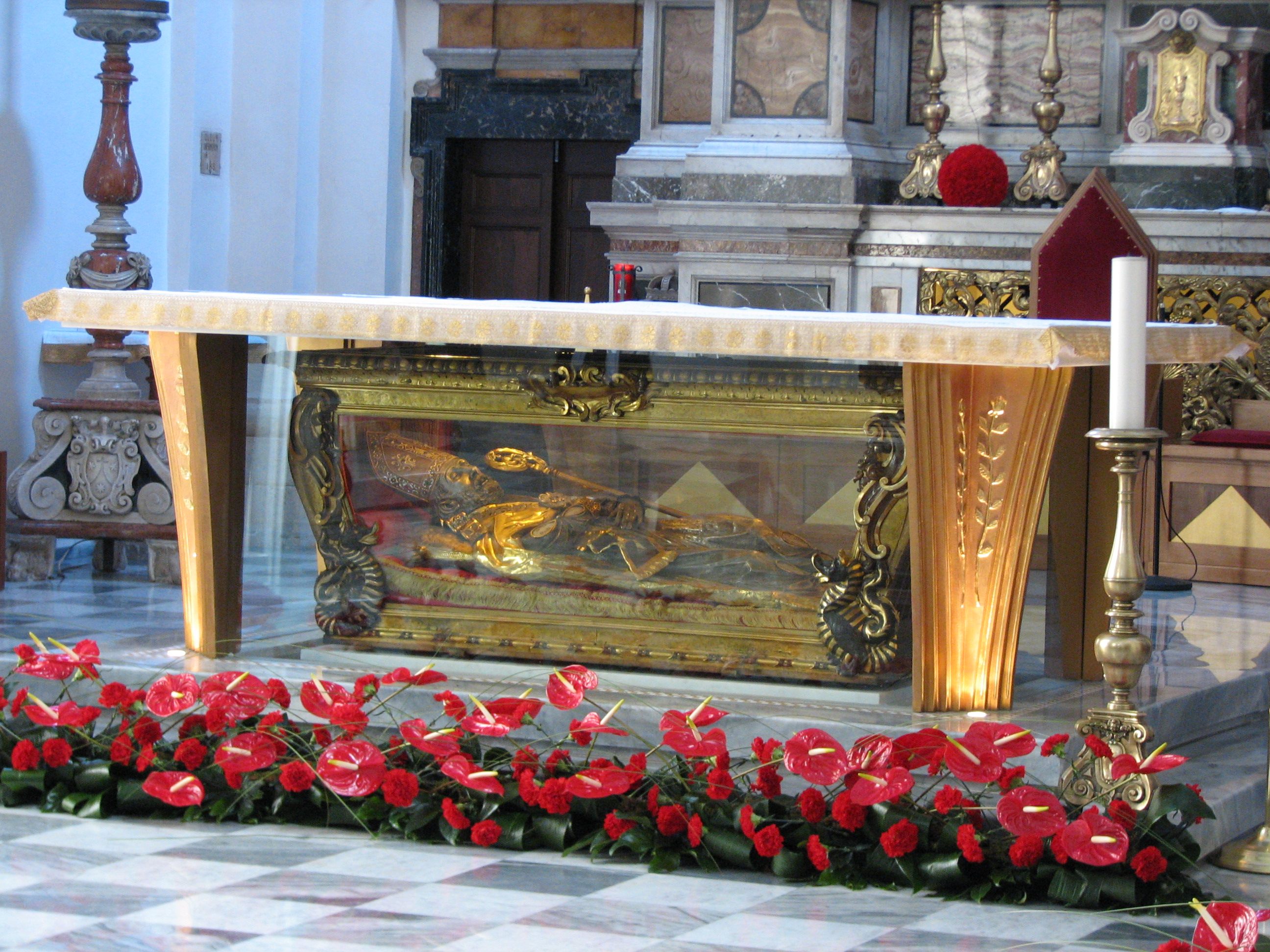 Altare della chiesa di San Valentino progetto dell'arch. Luca Volpi, con la raffigurazione del santo, patrono di Terni e degli innamorati(viva)